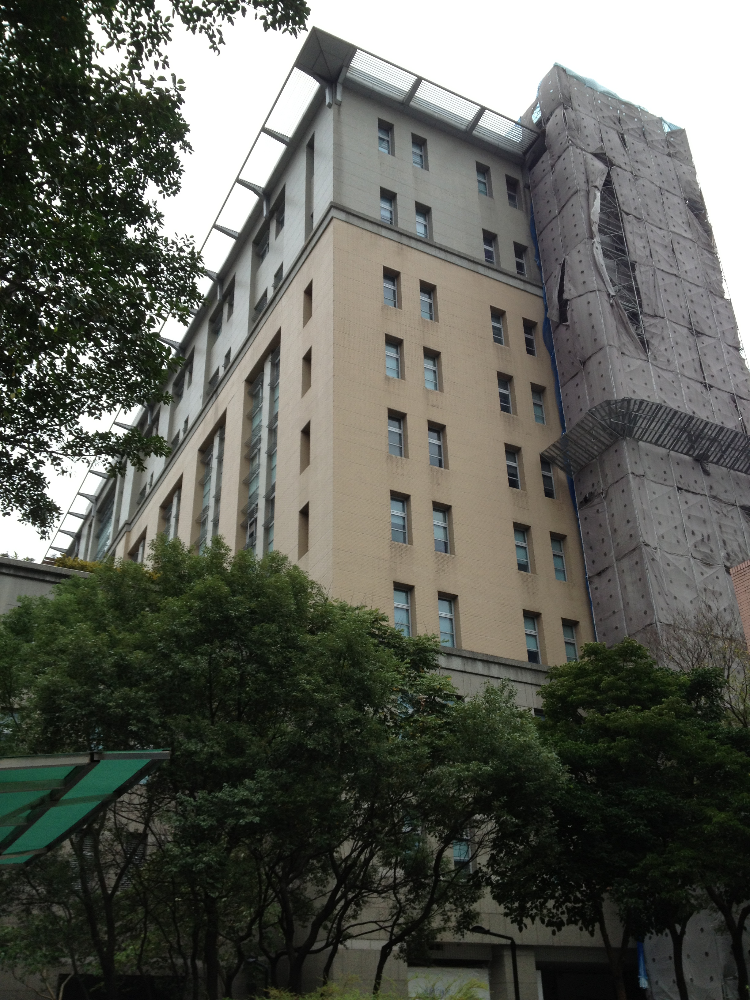 中文（台灣）: 公衛大樓目前現況，現在外牆正在整修